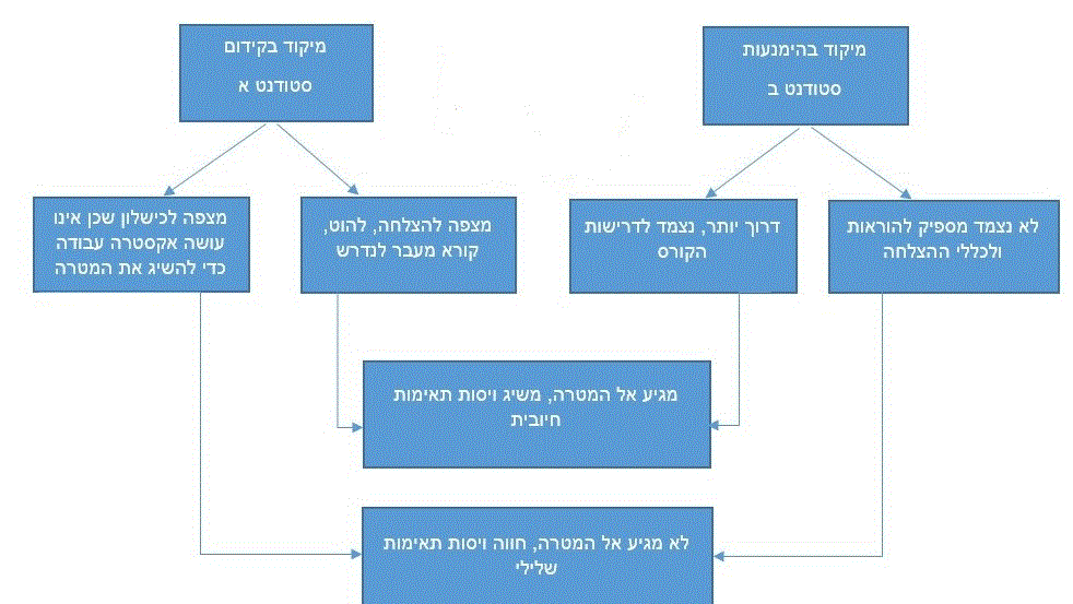 2 דרכים להשגת ציון 'מצוין' בקורס